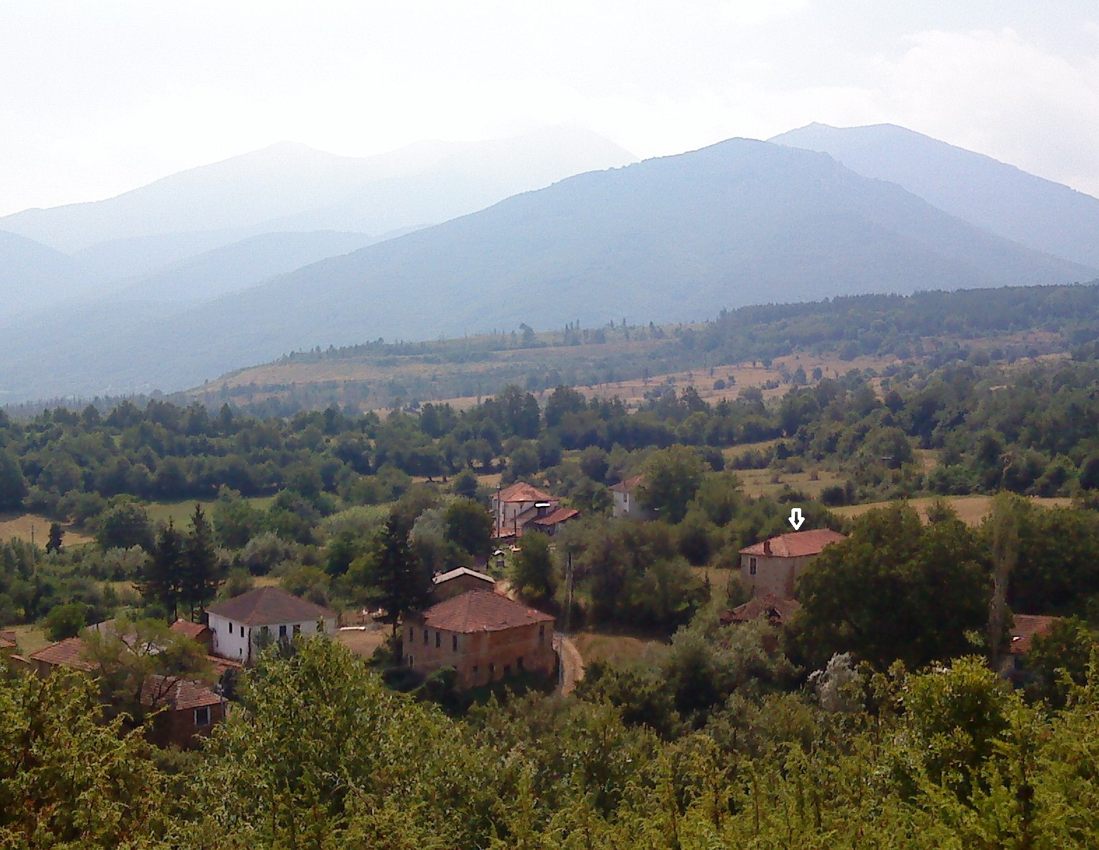 Село Ѓавато - Поранешен ученички интернат